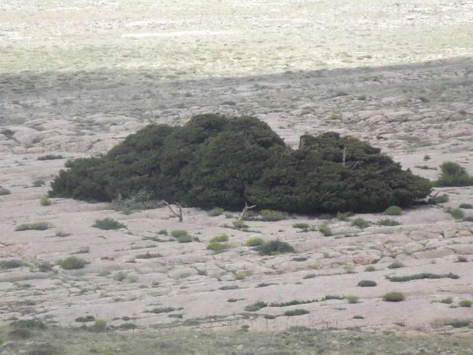 الشجرة النادرة - ثسطا ايسورن